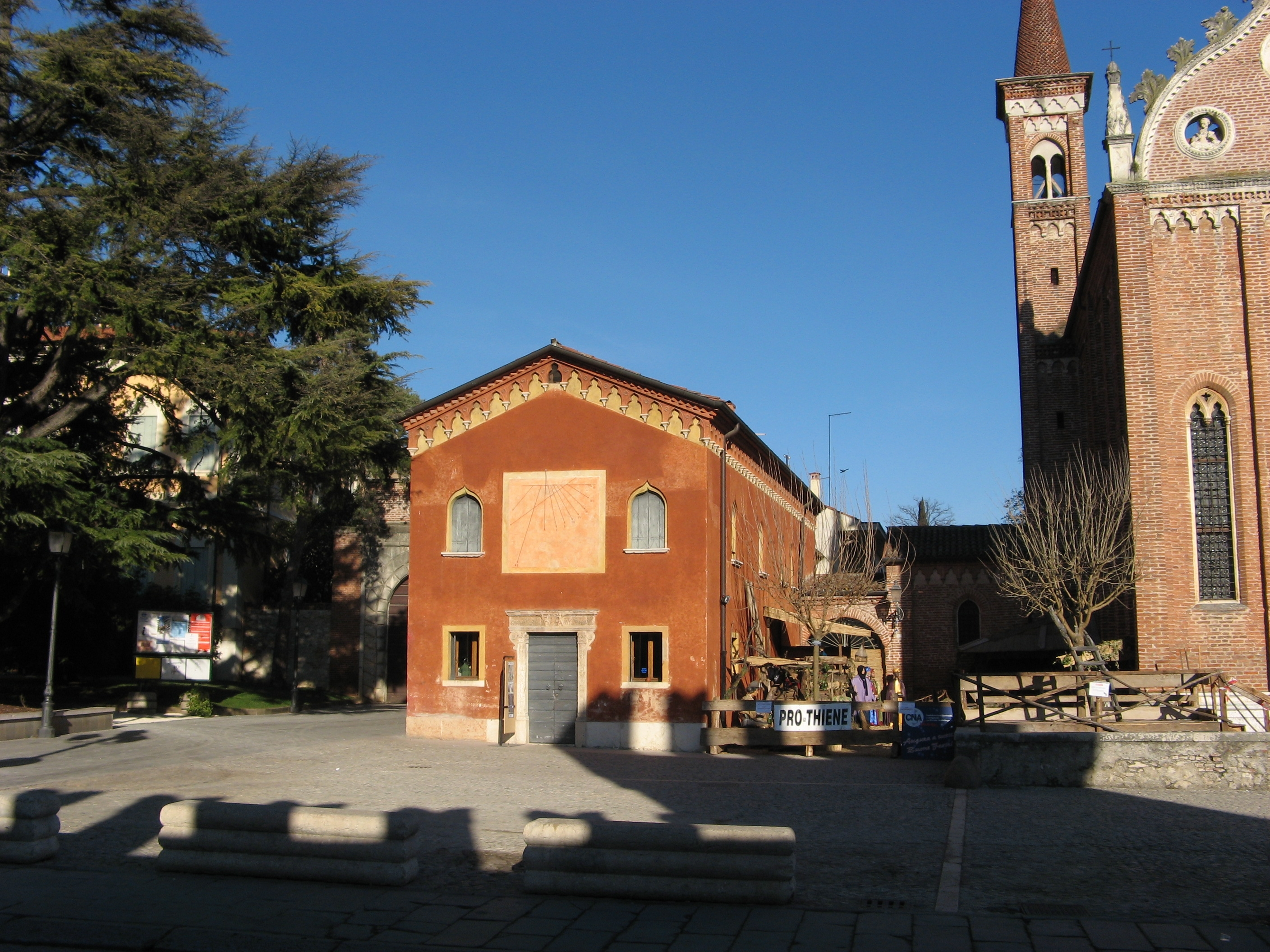 La "Casetta rossa" (sede della Pro Loco) a Thiene.